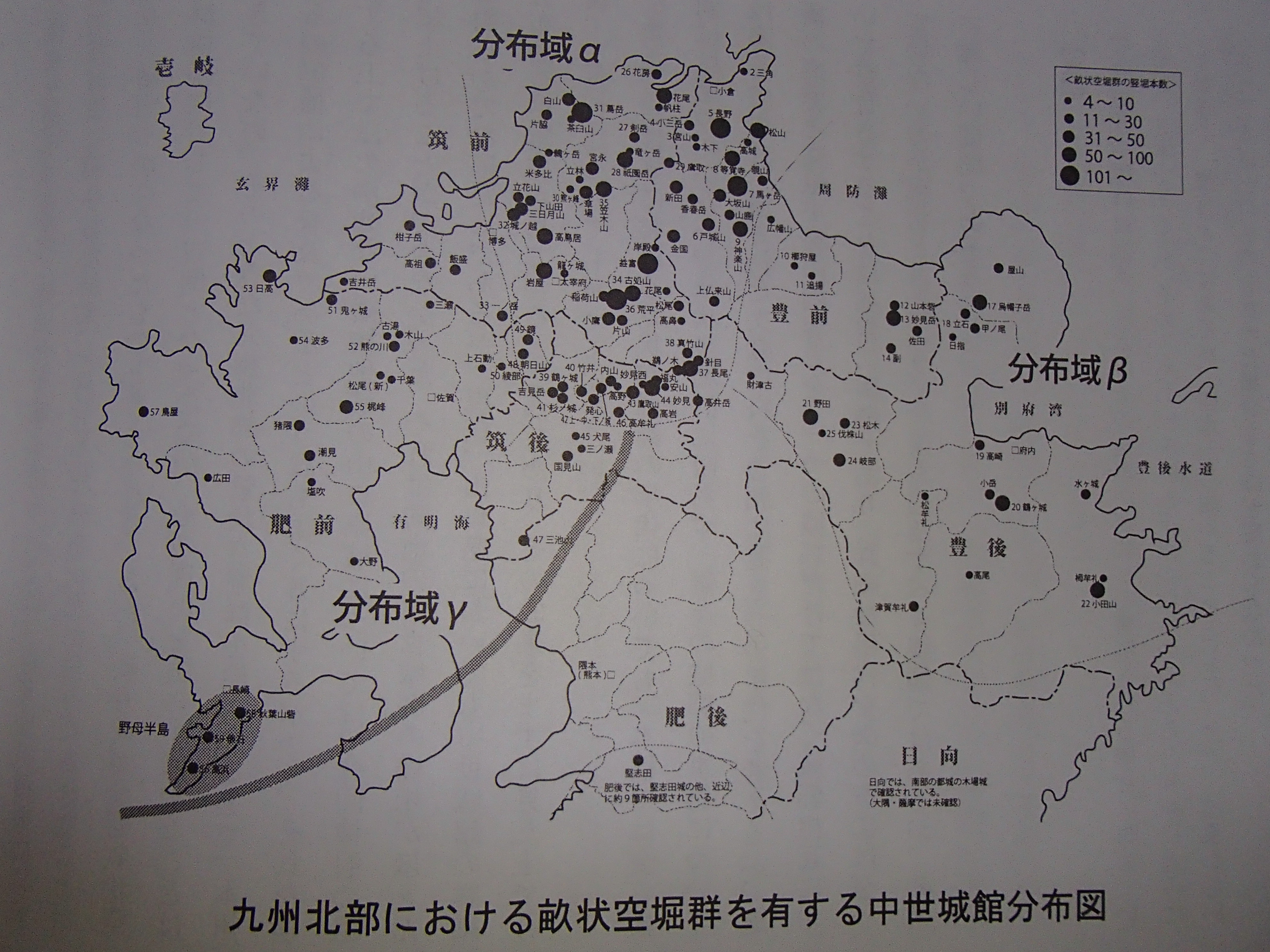 九州北部の連続空堀を持つ城の分布図